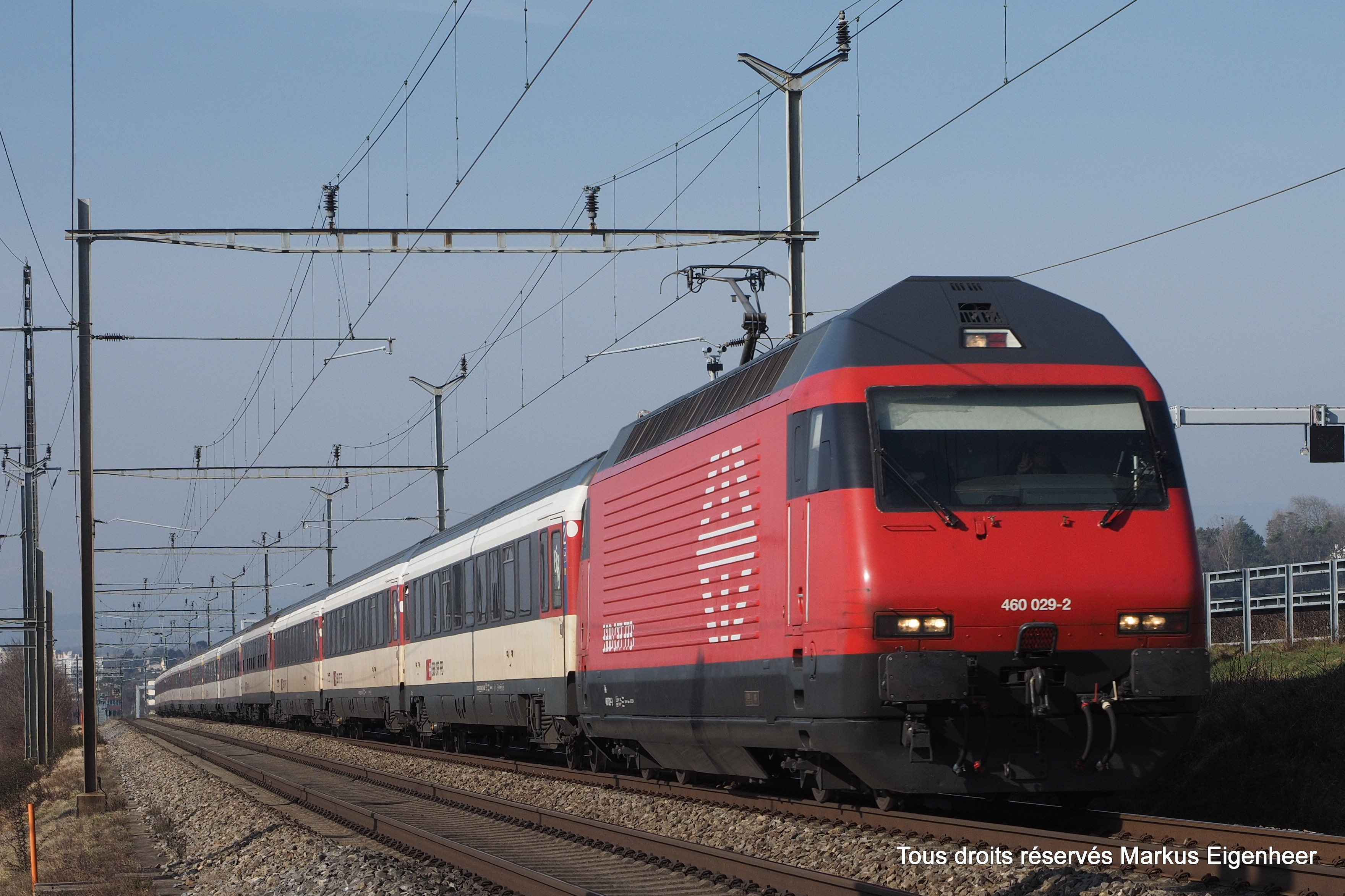 Denges-Echandens 13.03.2015